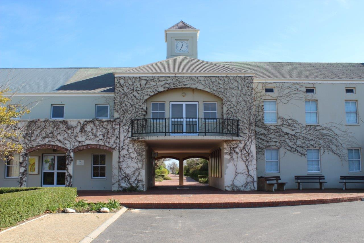 Bridge House School Hoofgebou